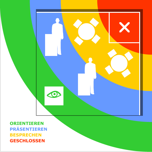 Dirk Bindmann